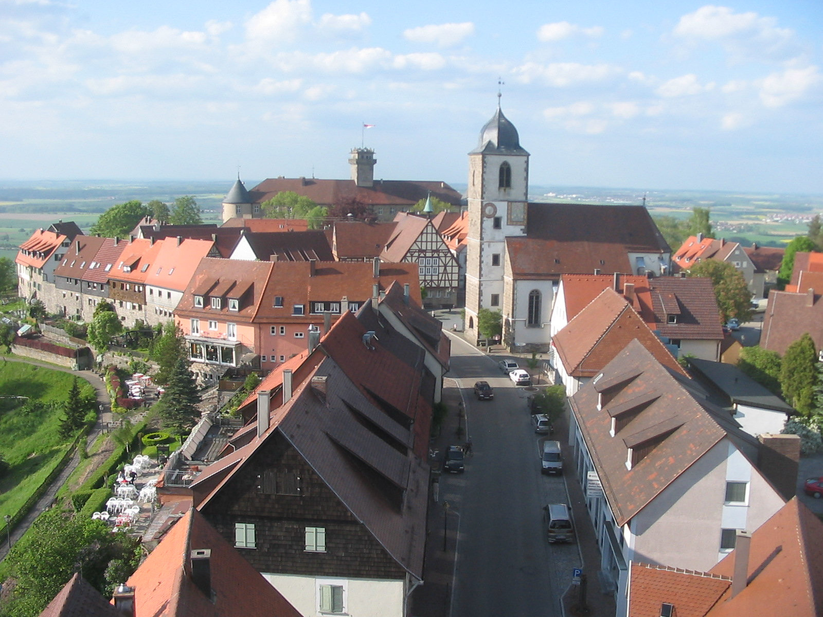 Der Ortskern von Waldenburg (Württemberg), Blick vom Bergfried (Staufferturm).